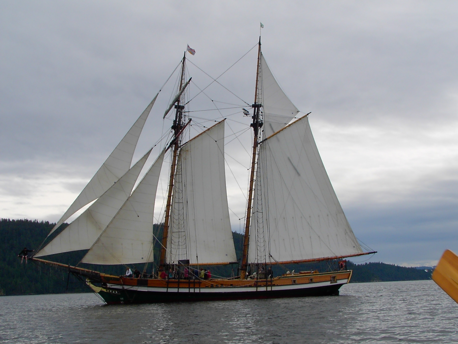 Le Pacific Swift voilier canadien de la SALT